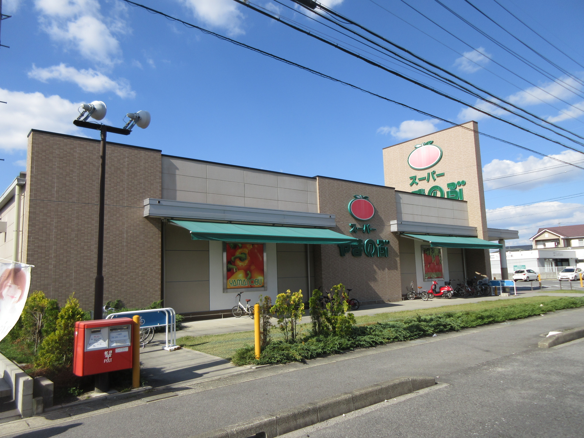 スーパーやまのぶ矢作店（岡崎市橋目町）